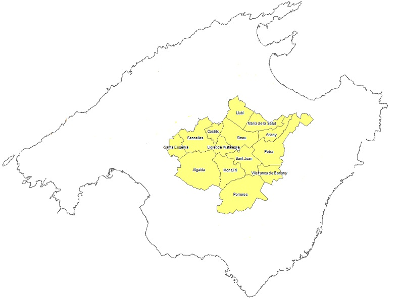 Pla de Mallorca